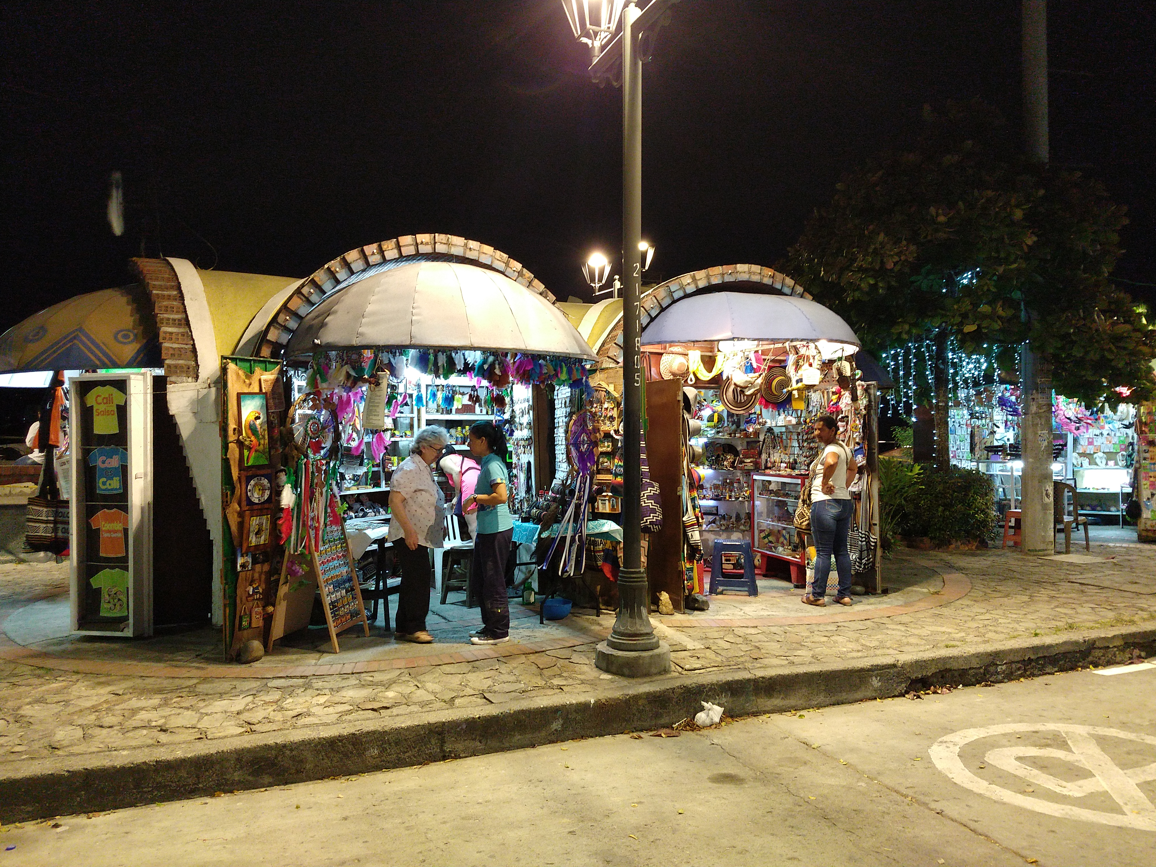 El parque artesanal de la Loma de la Cruz, durante la navidad de 2018 Esta fotografía fue tomada en el municipio colombiano con código 76001.